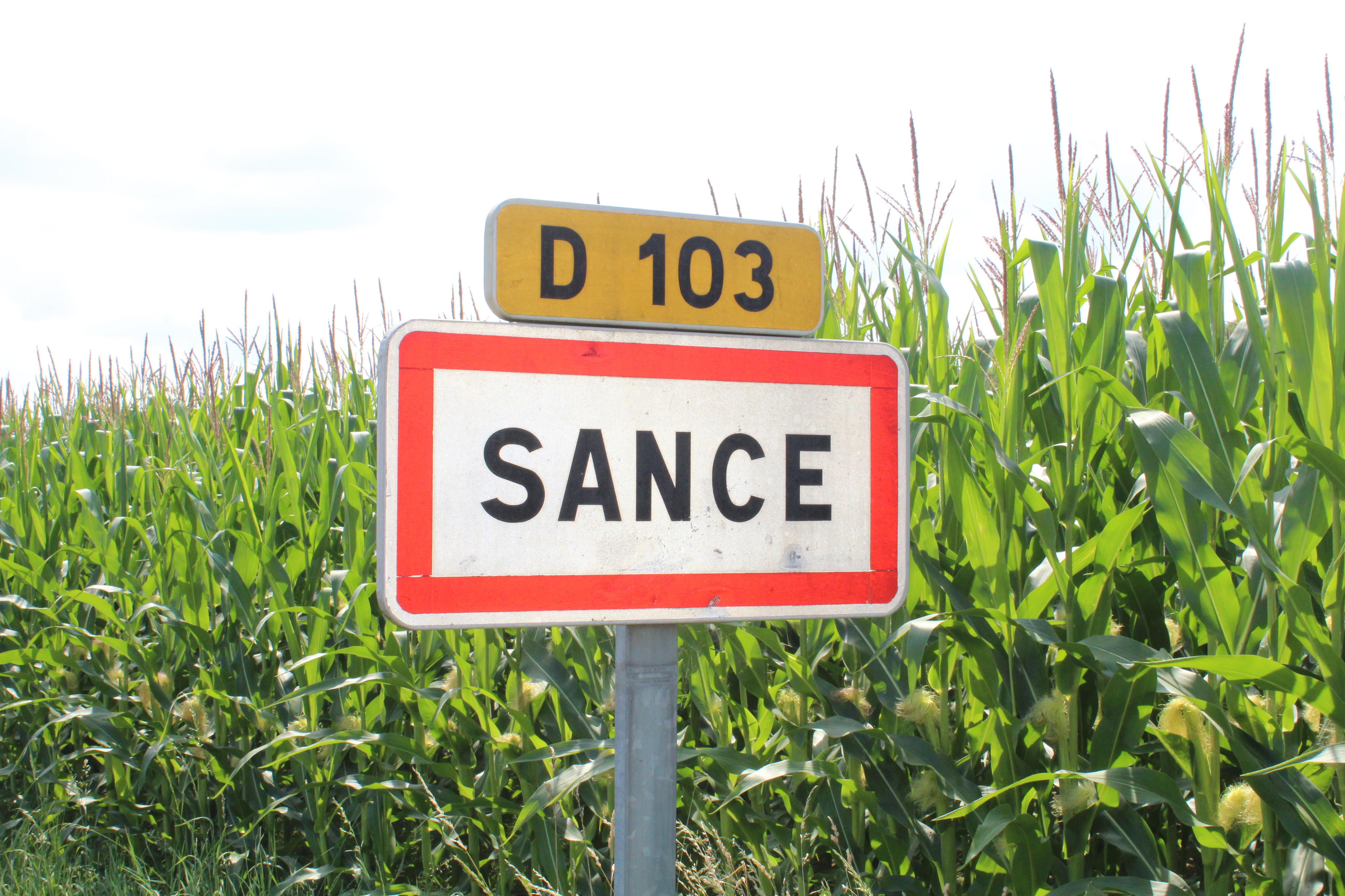 Panneau d'entrée dans Sancé.